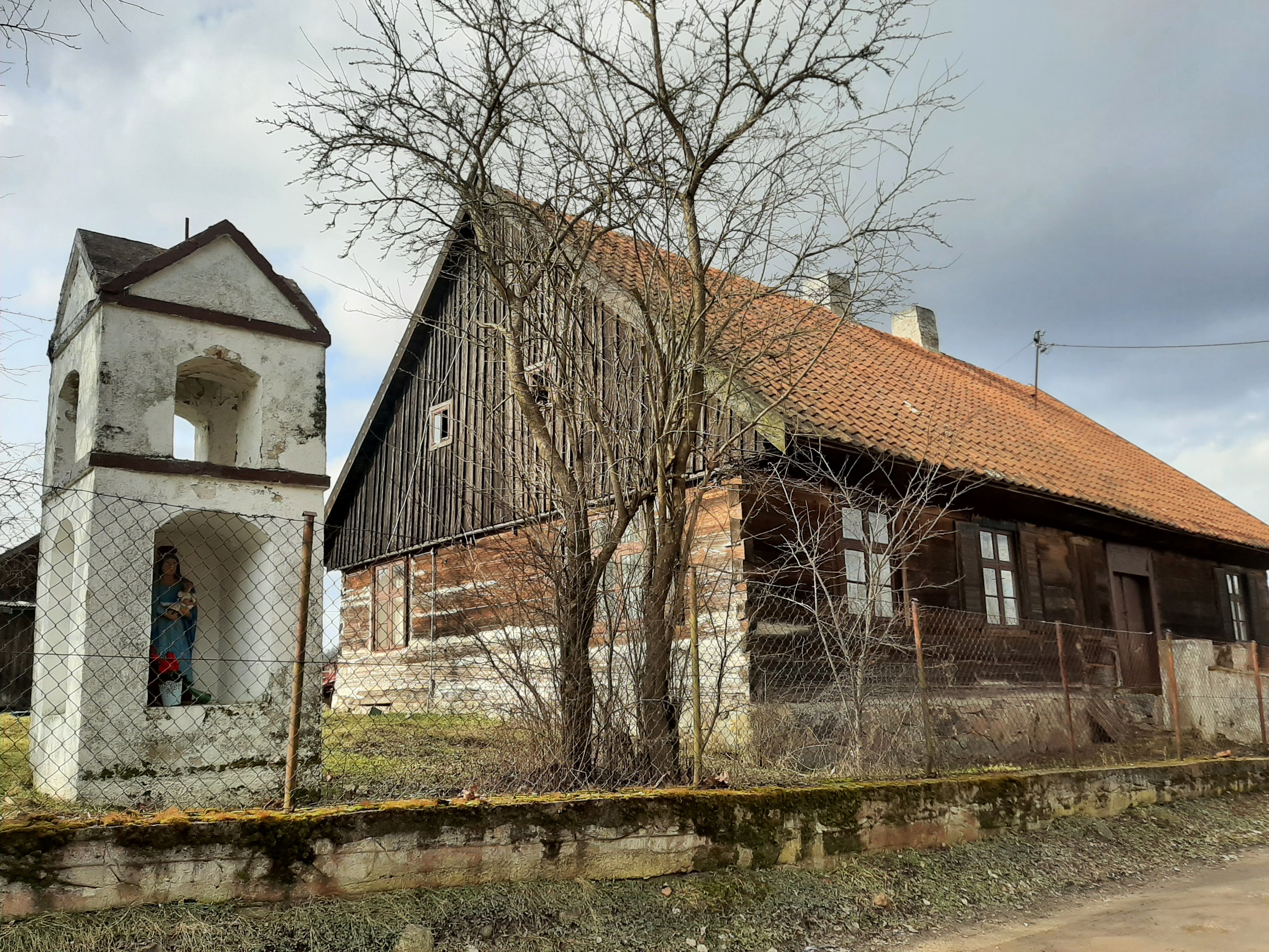 Drewniany dom (sołtysa) w Kajnach